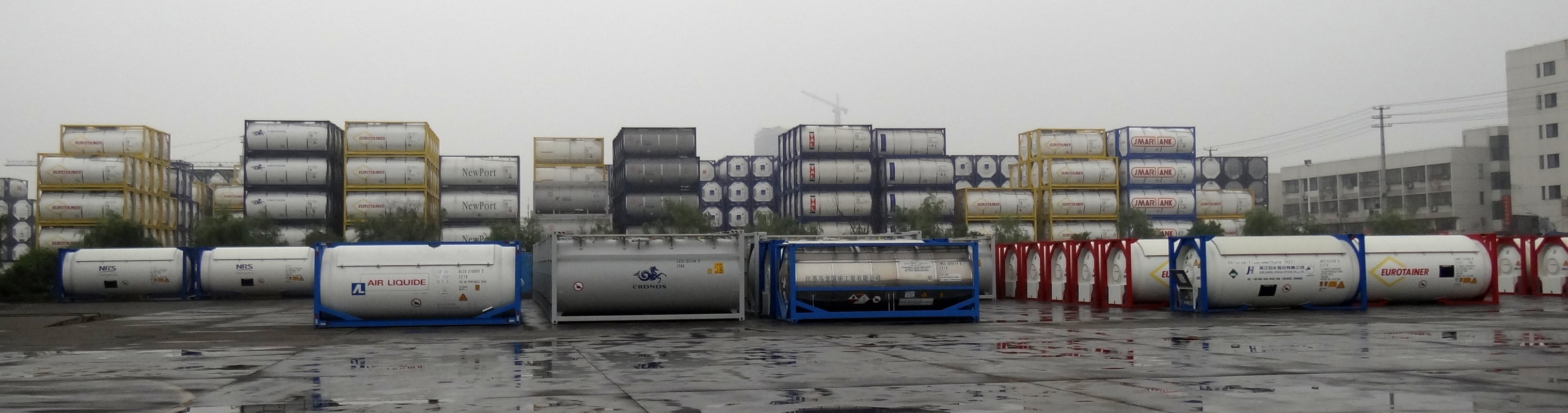 Танк контейнеры CIMC